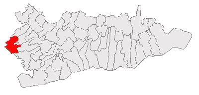 Categorie:Hărţi ale judeţului Călăraşi